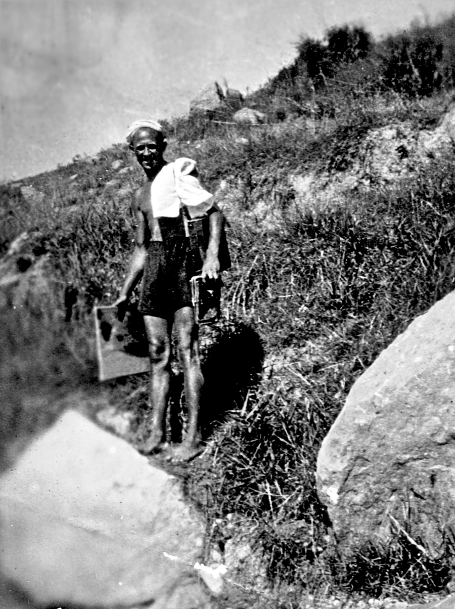 Сергей Маркин на этюдах